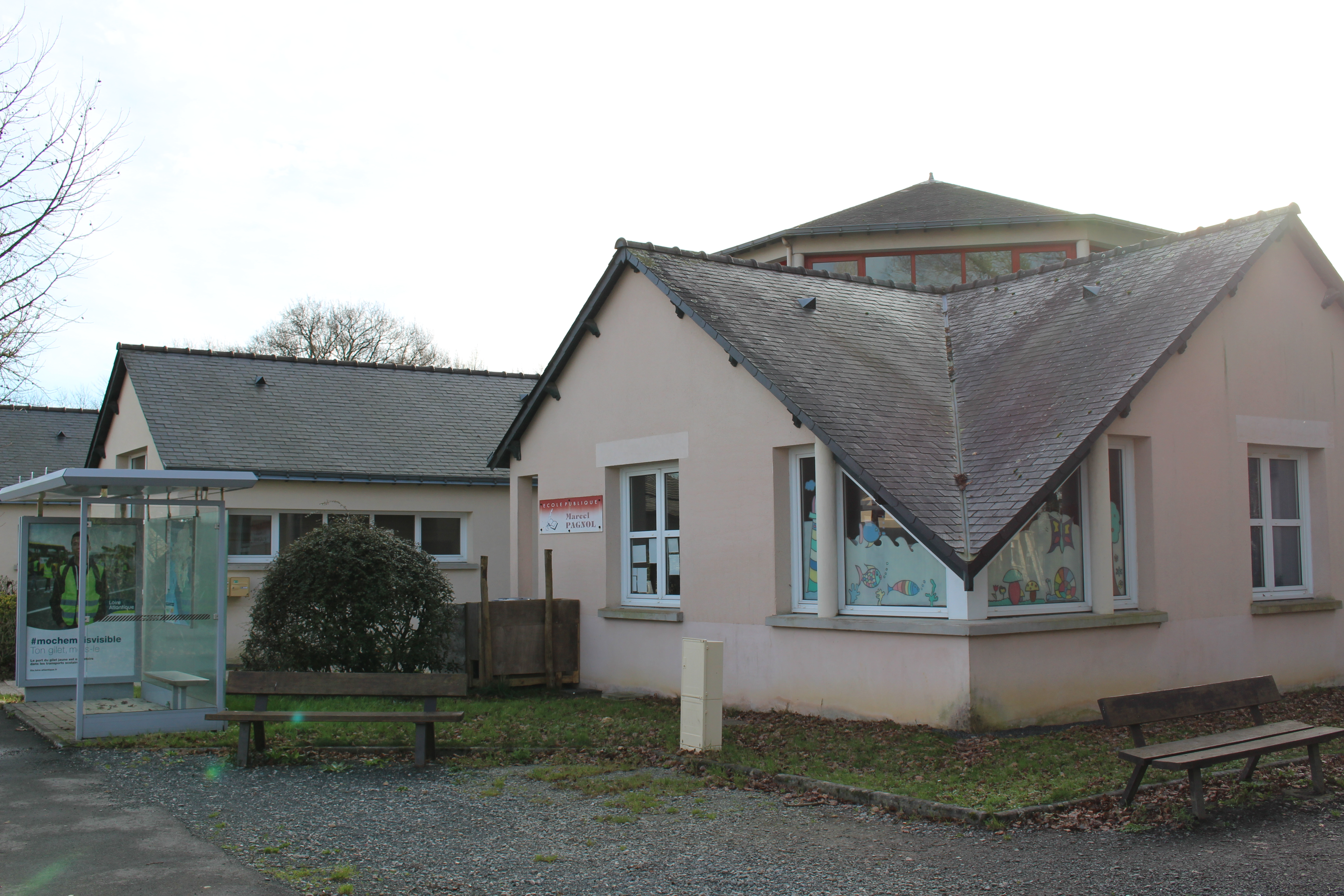 Notre-Dame-des-Landes, Loire-Atlantique